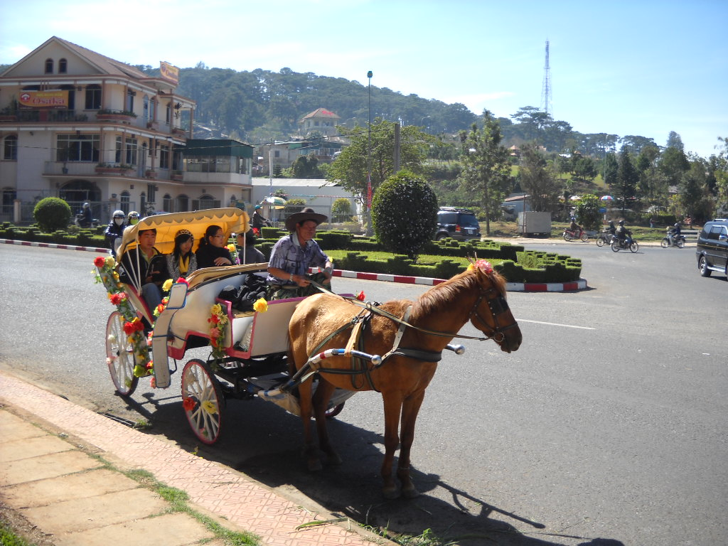 Xe ngựa, Đà Lạt